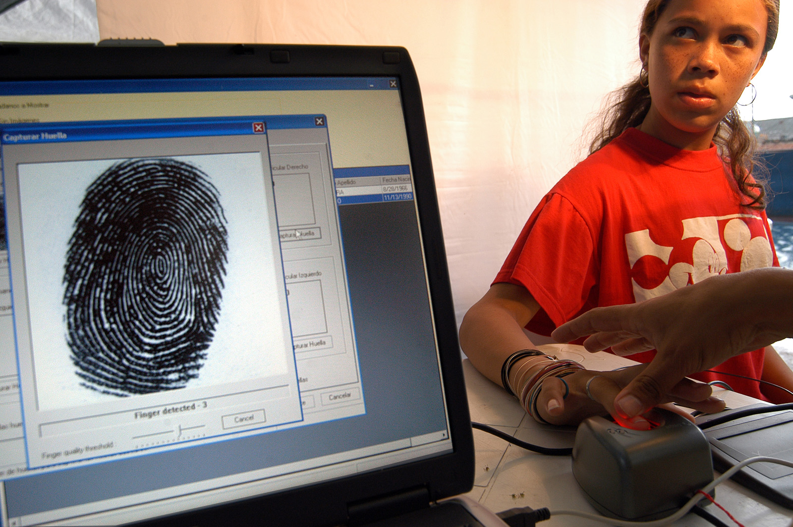 Cedulacion de venezolanos en una parroquia de Caracas. Lugar: Alta Vista, Catia, Municipio Libertador, Caracas, Venezuela. Fecha: 17 de Abril de 2004